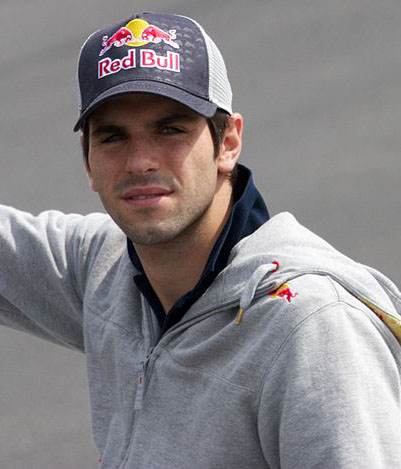 Jaime Alguersuari during 2010 Canadian GP